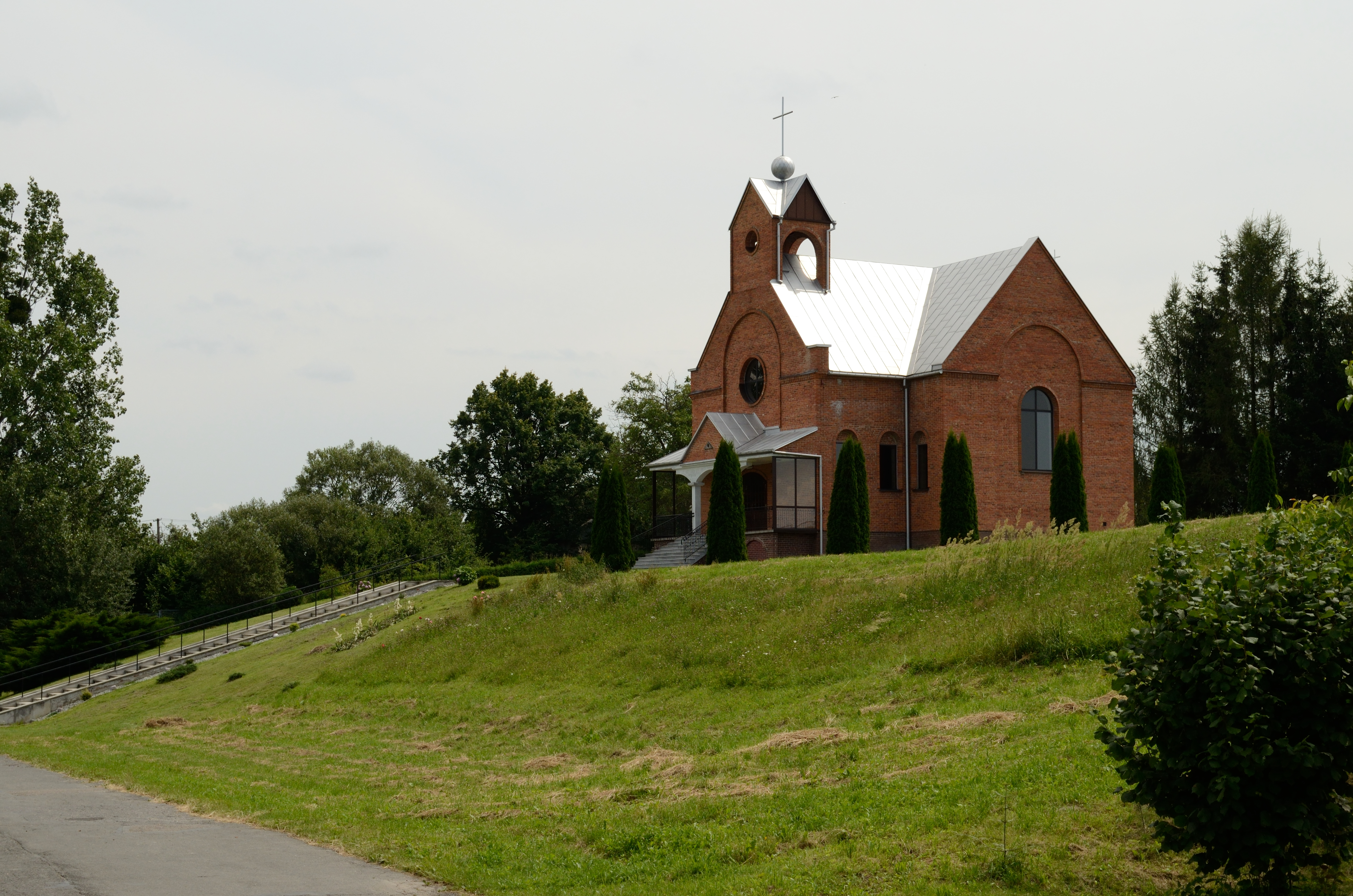 Kostel ve vesnici Rachodoszcze, Polsko